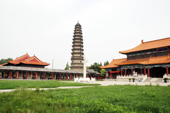 汶上